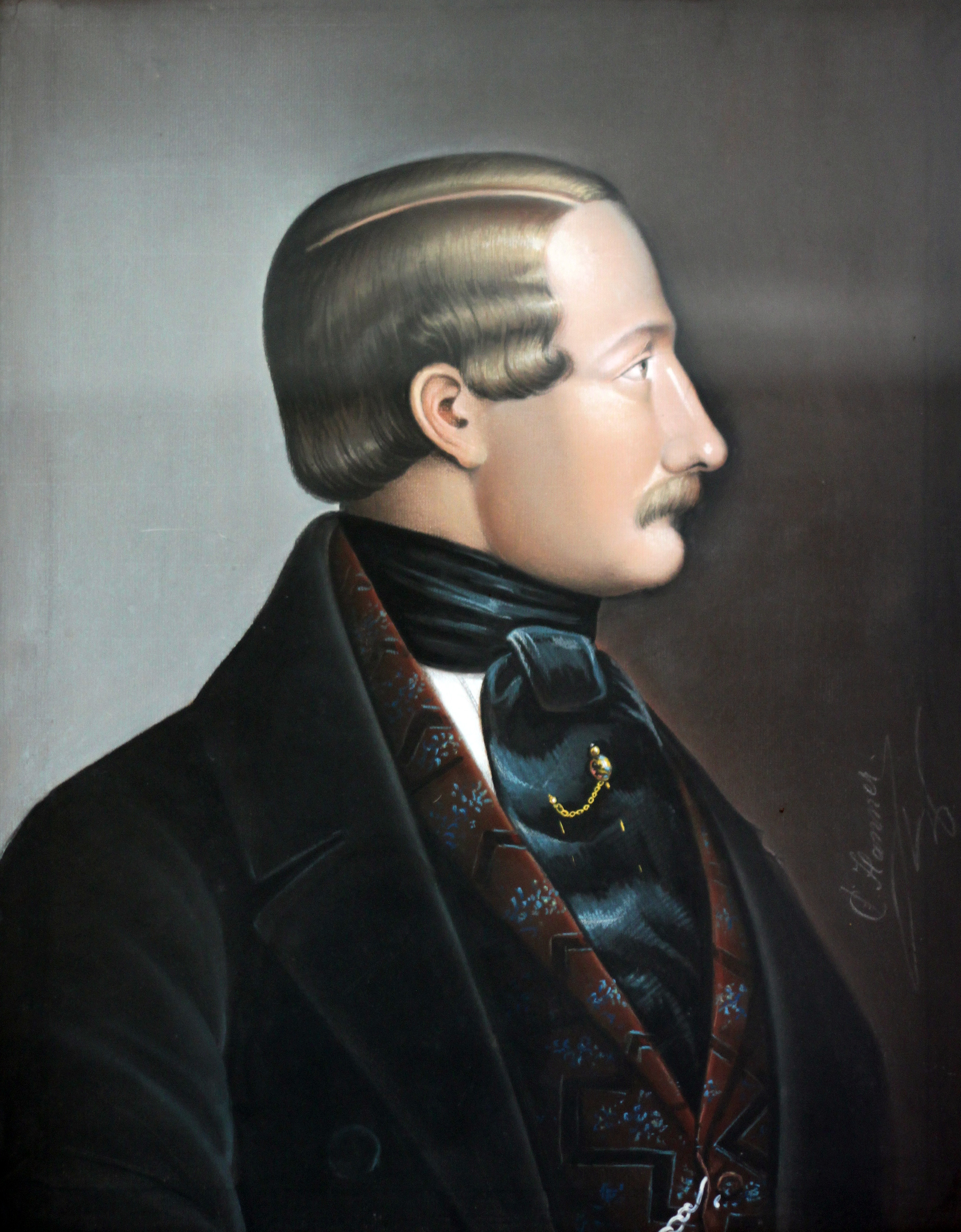 Heinrich Reiser (1805–1889). Pastell von Constantin Hanner, ca. 1860, 51 x 40 cm